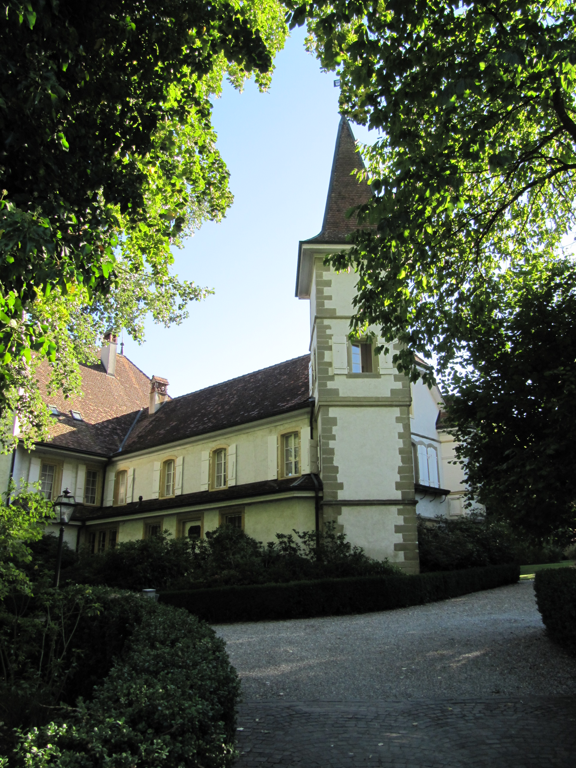 Manoir de Reynold, Cressier, Fribourg, Suisse